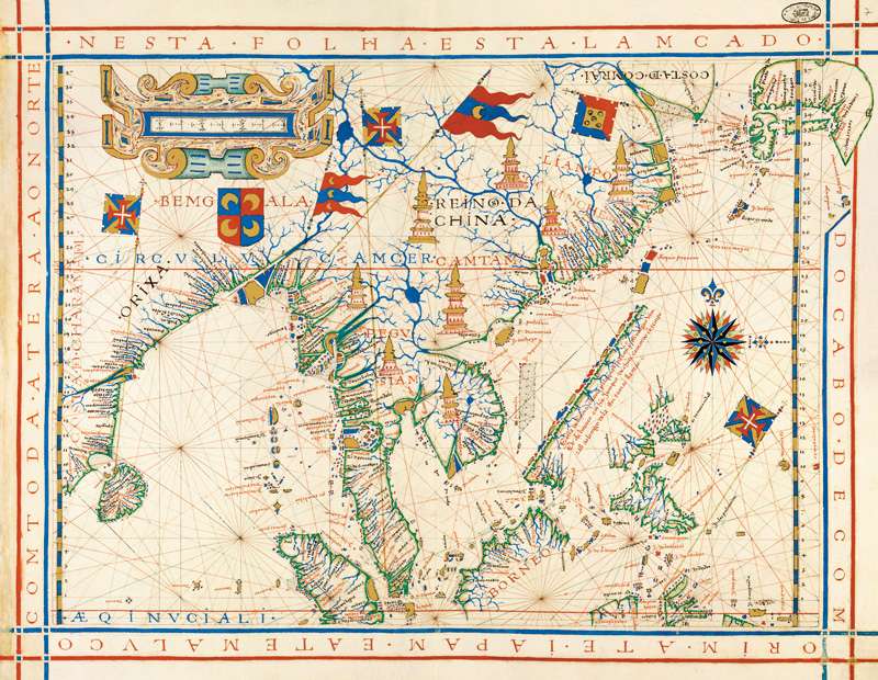 Atlas portugués de 1571